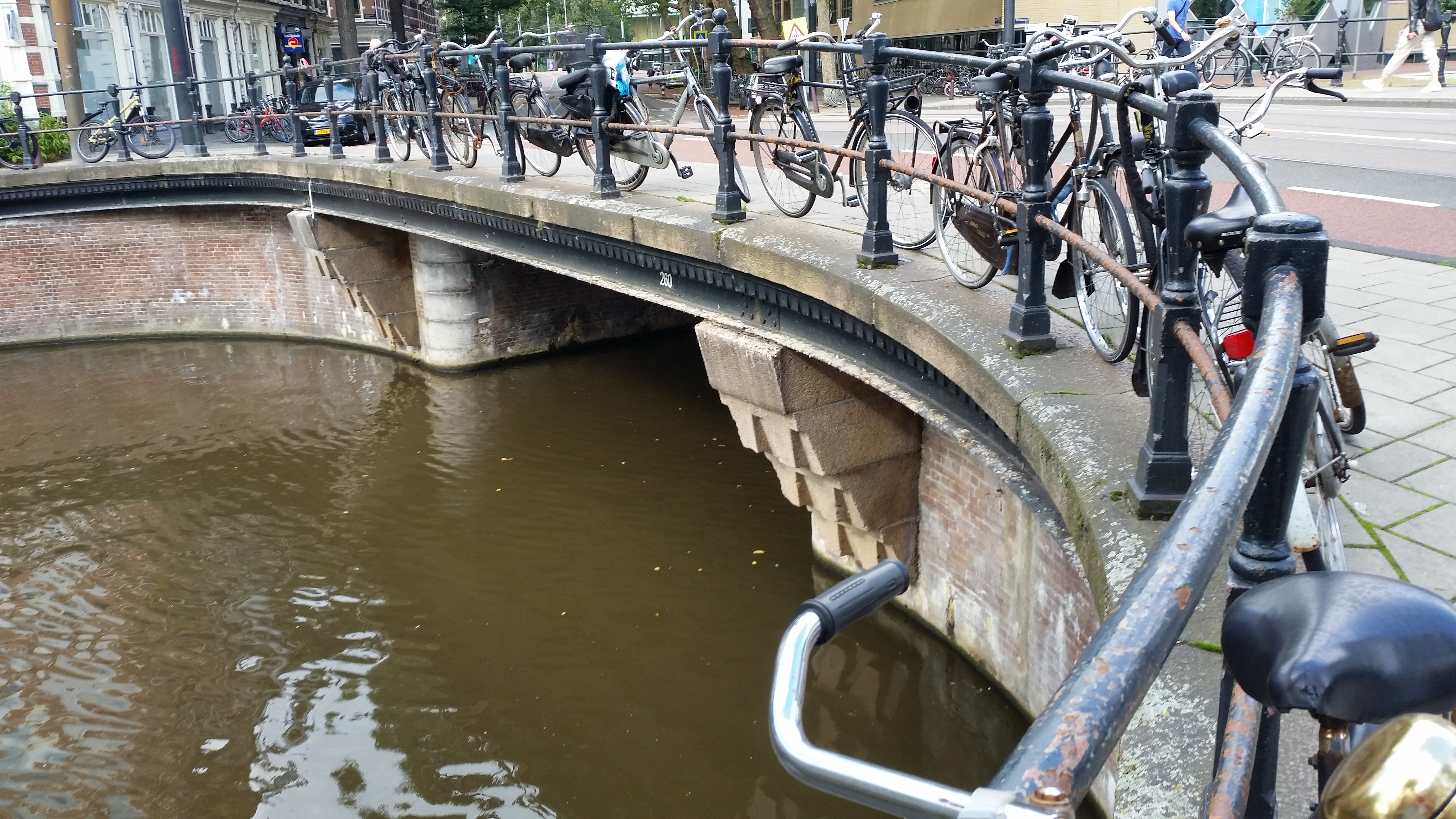 Brugverbreding van Brug 260, Halverstadbrug